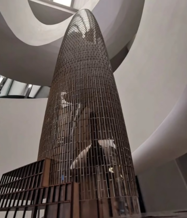 Es una maqueta hecha por Sordo Madaleno para representar como va a quedar construida la torre Reforma-Colón, un edificio planeado para la Ciudad de México.